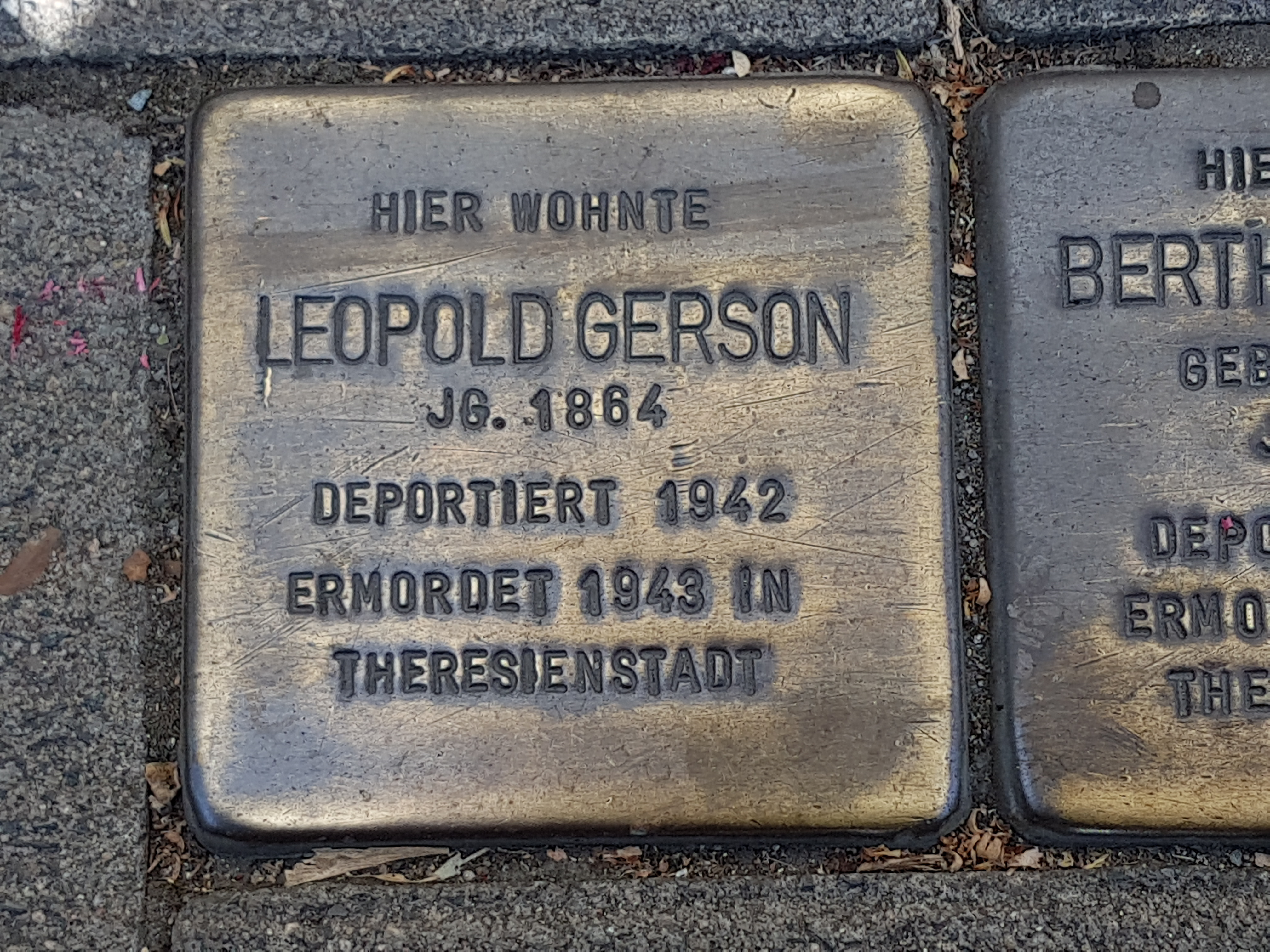 Stolperstein Duisburg